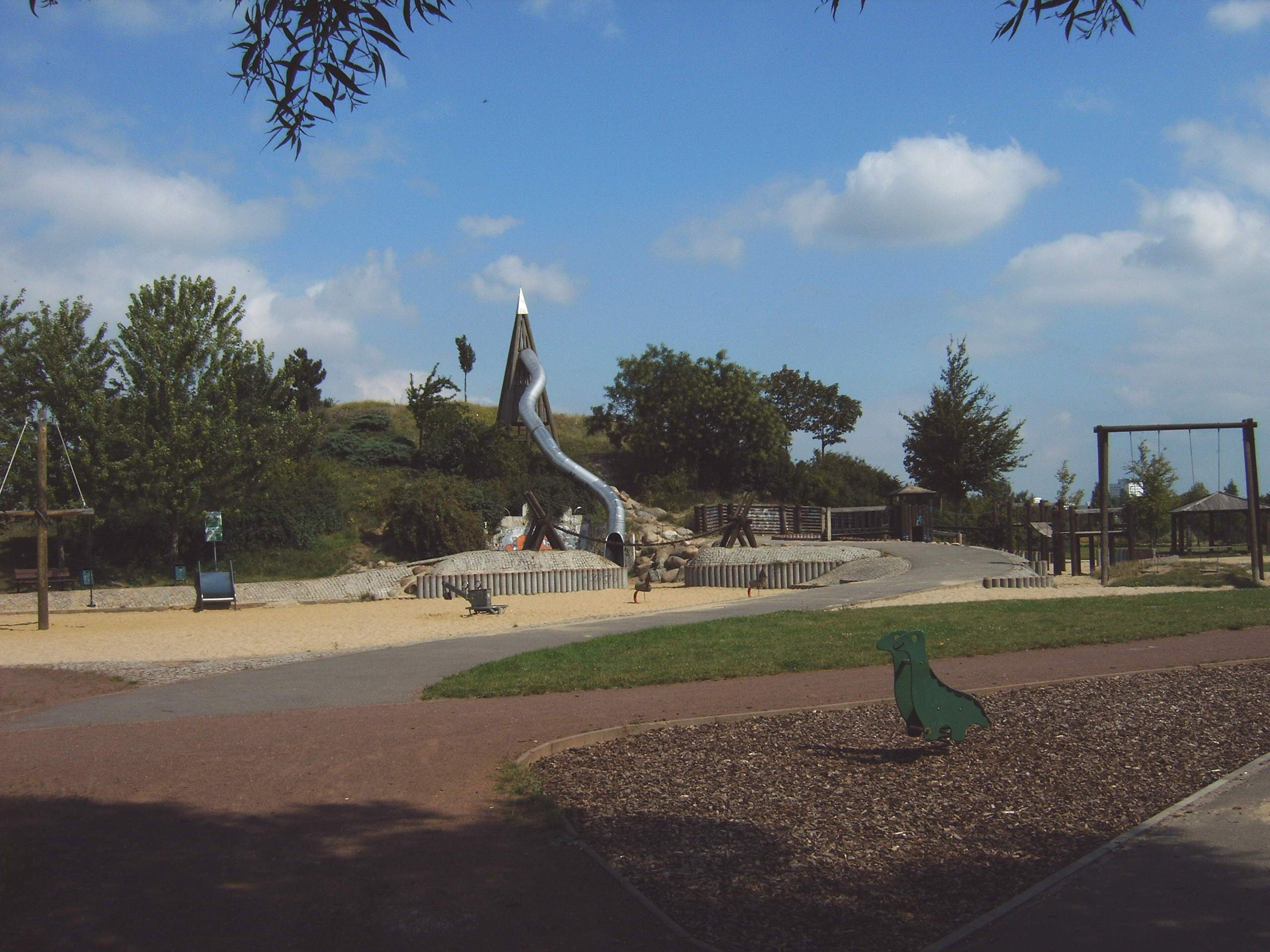 Florapark in Magdeburg, Spielplatz und Hügel im östlichen Teil